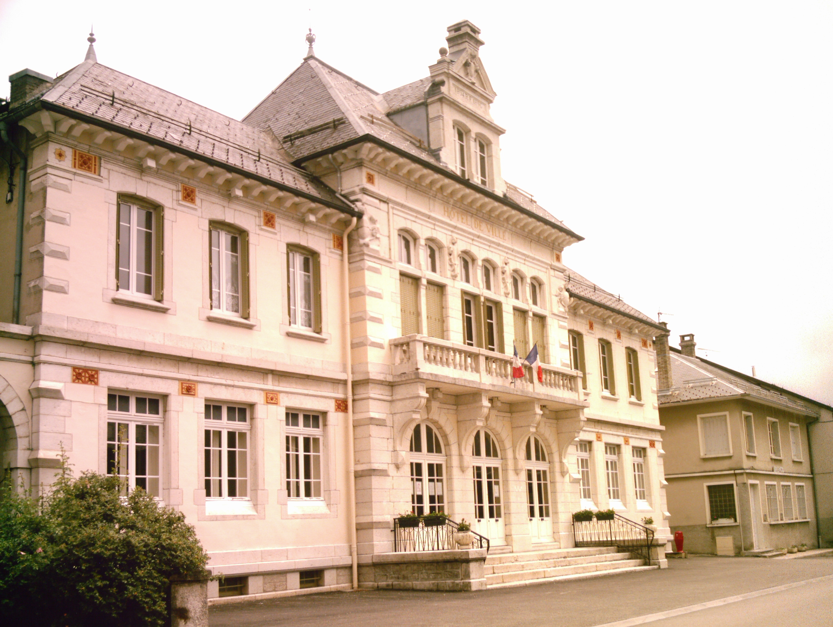 L'hôtel de ville de Brénod (Ain, FRANCE=